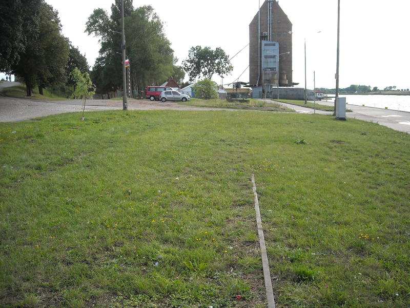 Linia kolejowa Kamień Pomorski - Kamień Pomorski Port